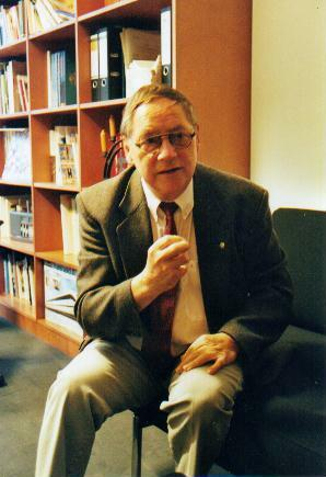 Hans-Eberhard Urbaniak 2001 in seinem Bundestags-Büro in Berlin.